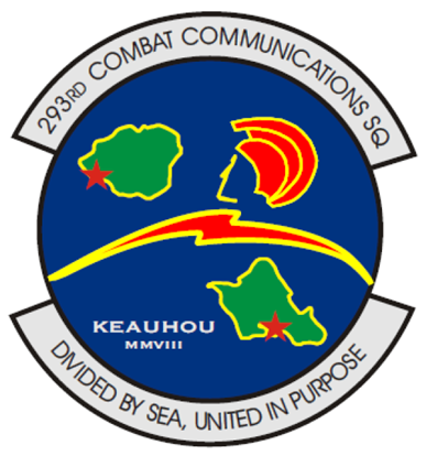 293 CBCS Logo